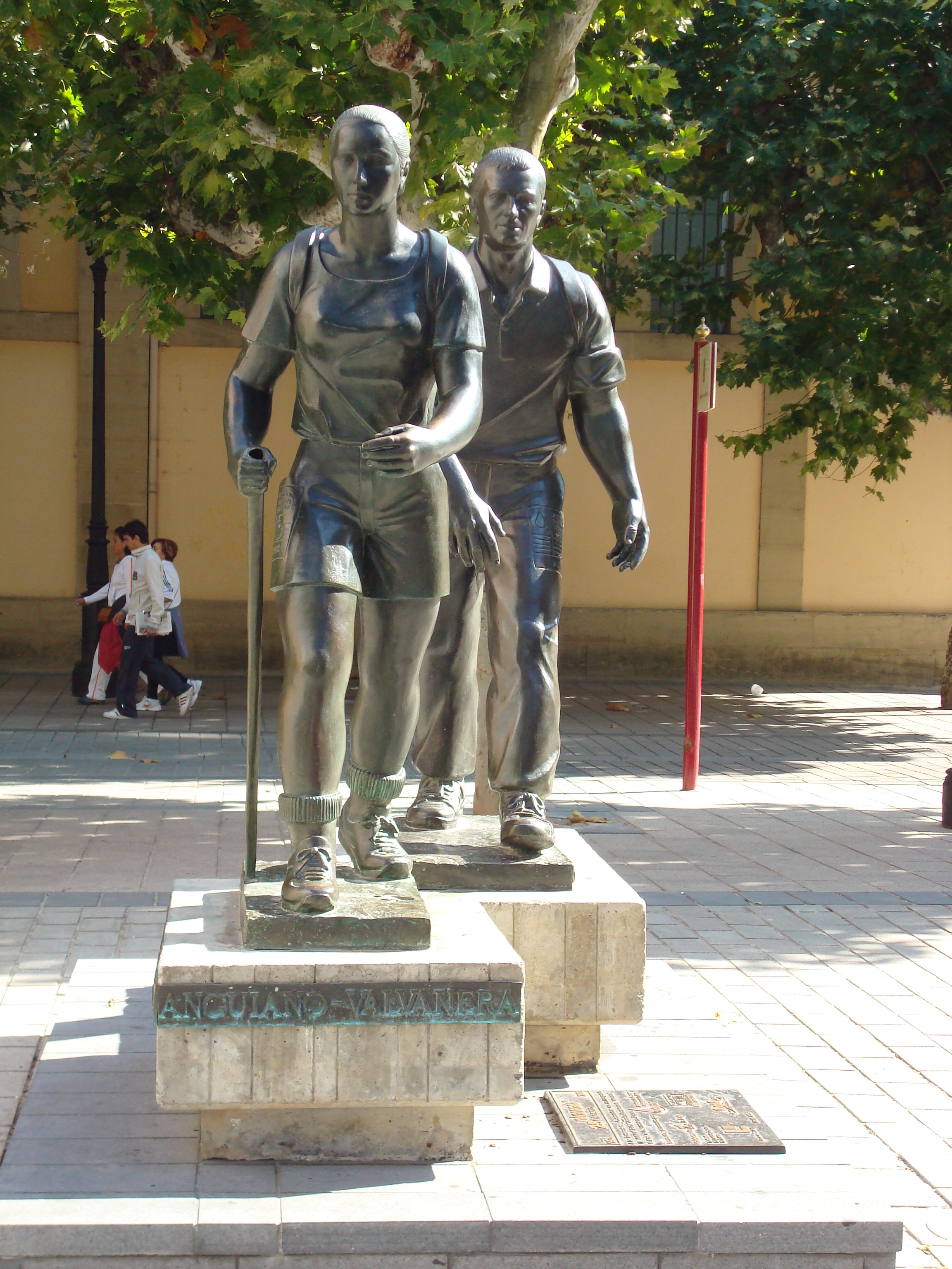 Logroño - 016